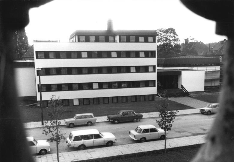 Dresden, Ordinariatsgebäude ADN-ZB Häßler 2.10.1980 Dresden: Ein neues Ordinariatsgebäude der Röm.-Kath. Kirche im Bistum Dresden-Meißen wurde am 1.10.1980 seiner Bestimmung übergeben. Information added by Wikimedia users.Bischöfliches Ordinariat; Käthe-Kollwitz-Ufer 84 01309 Dresden